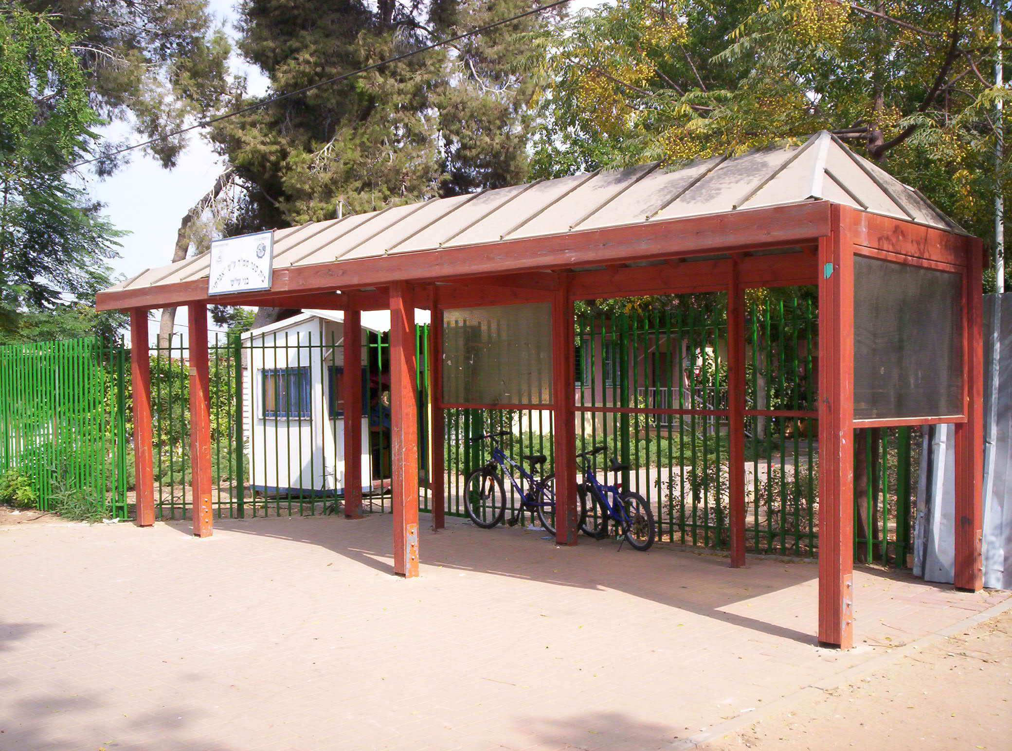 בית ספר אפרתי